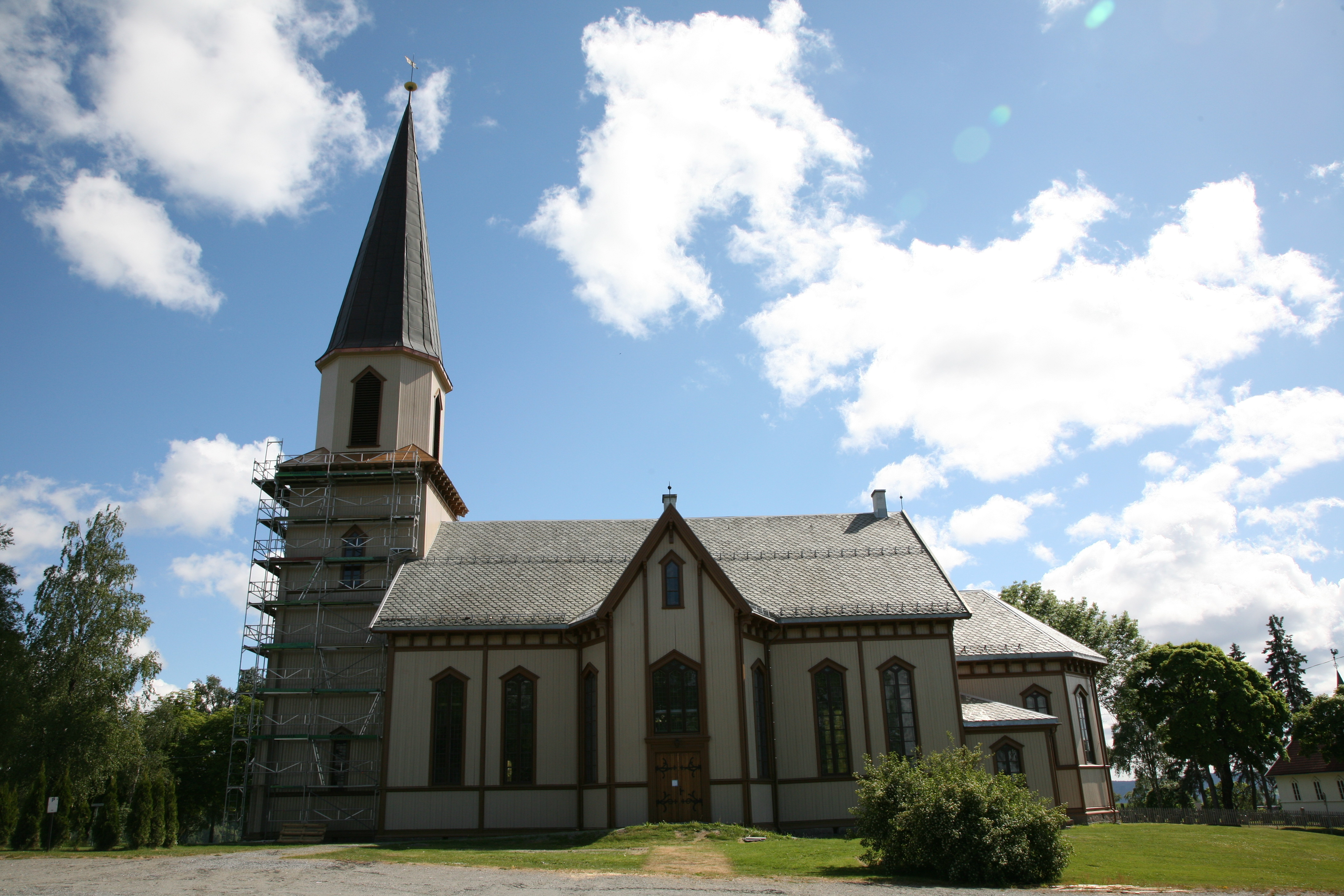 Fet church in Fet, Akershus, Norway